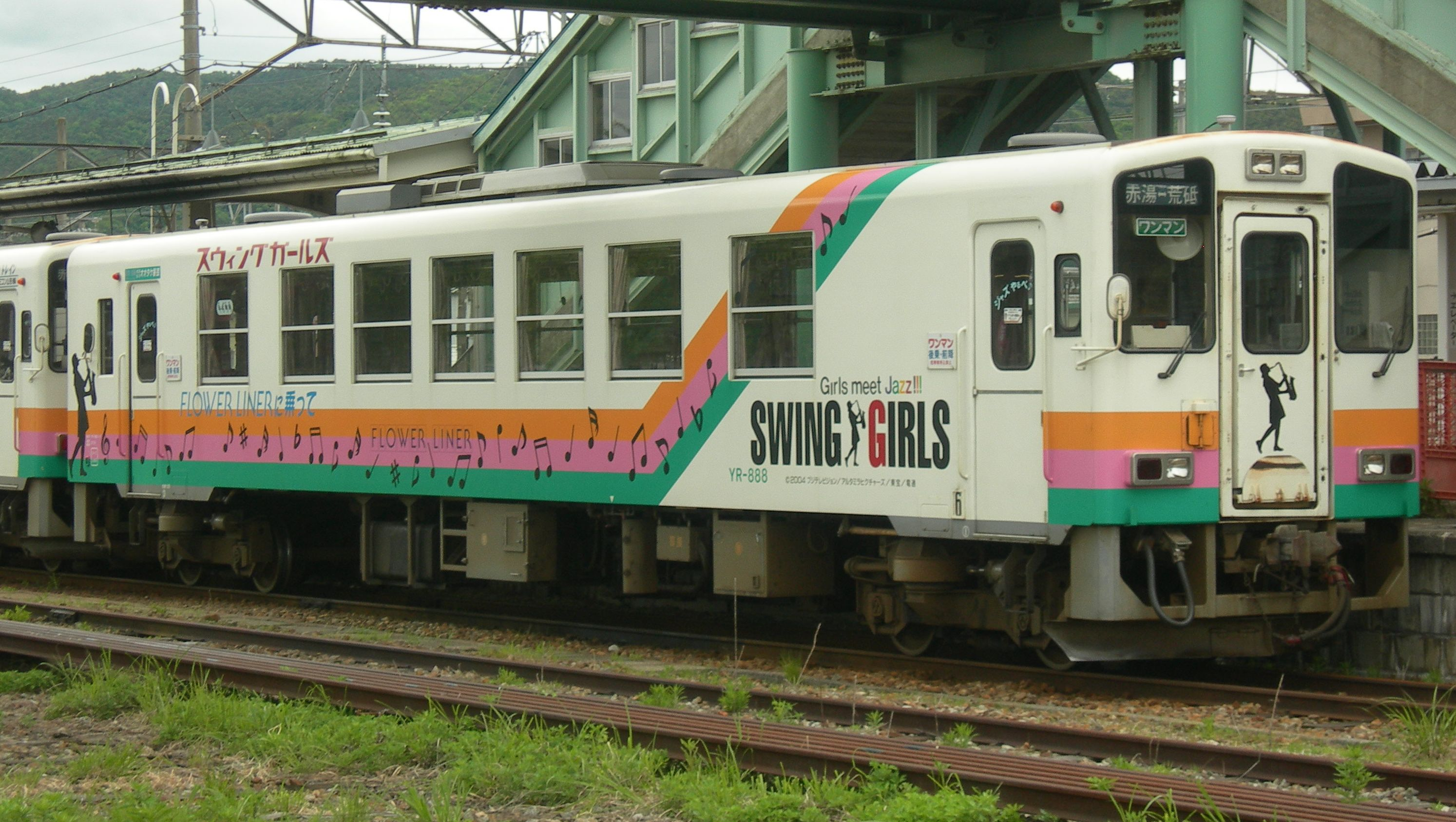 山形鉄道 YR-880形888